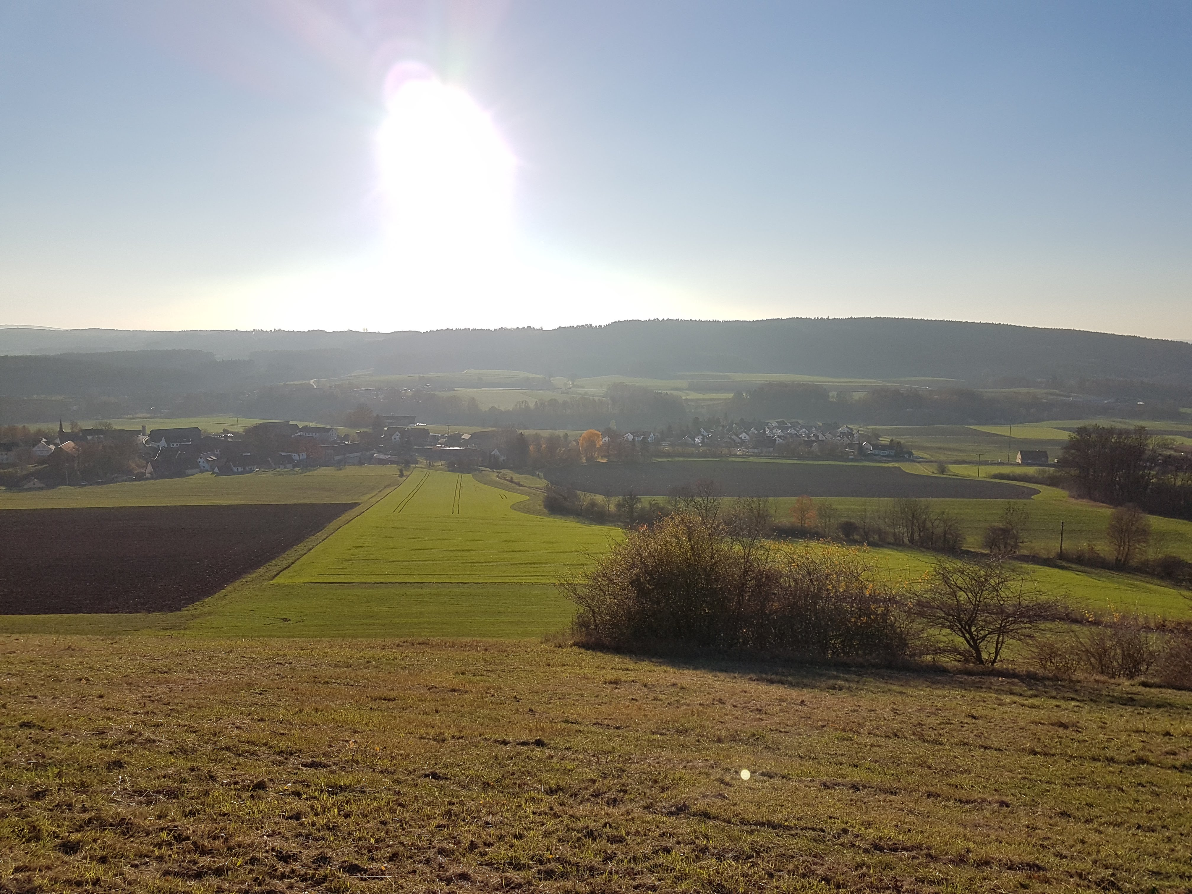 Der Ort vom Pensenberg aus fotografiert.